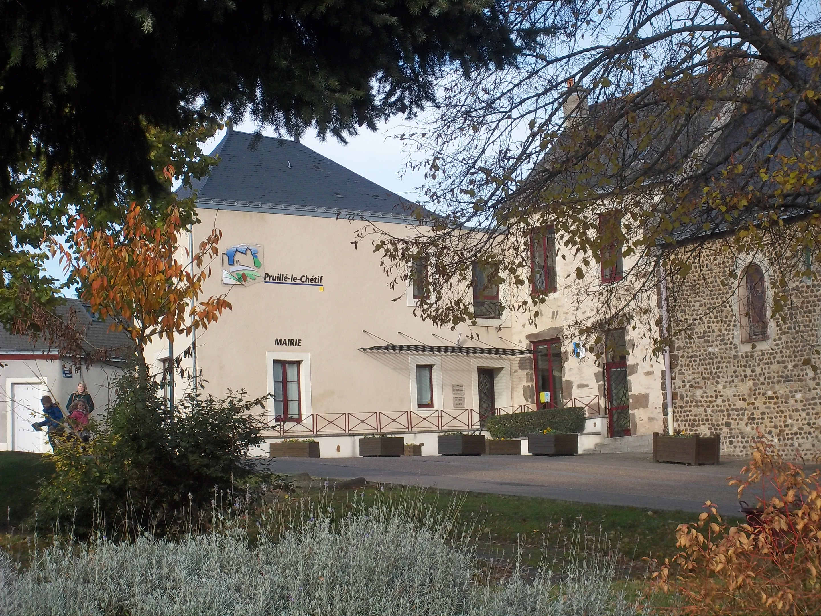 Mairie